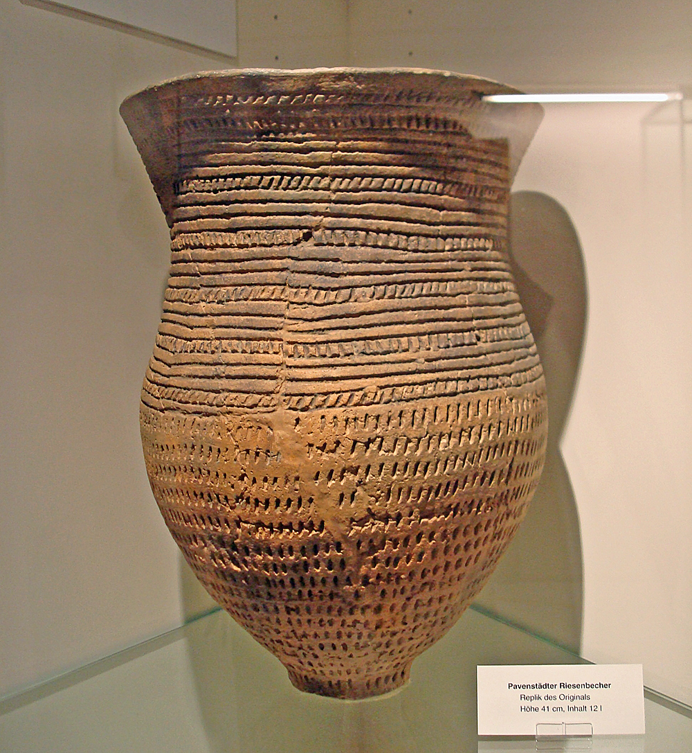 Nachbildung des Pavenstädter Riesenbechers, benannt nach seinem Fundort Gütersloh-Pavenstädt Pavenstädter Riesenbecher